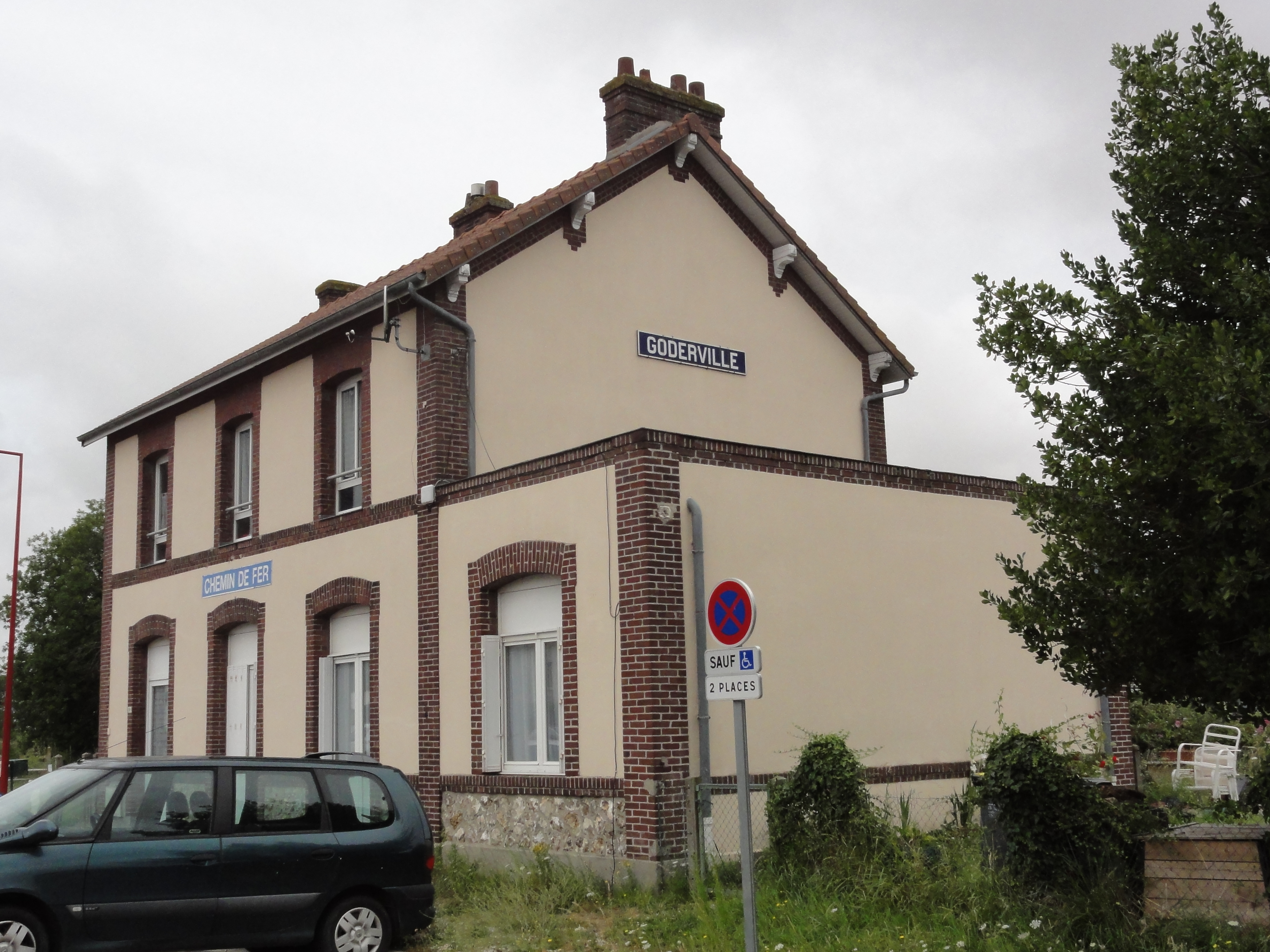 Goderville (Seine-Mar.) ancienne gare